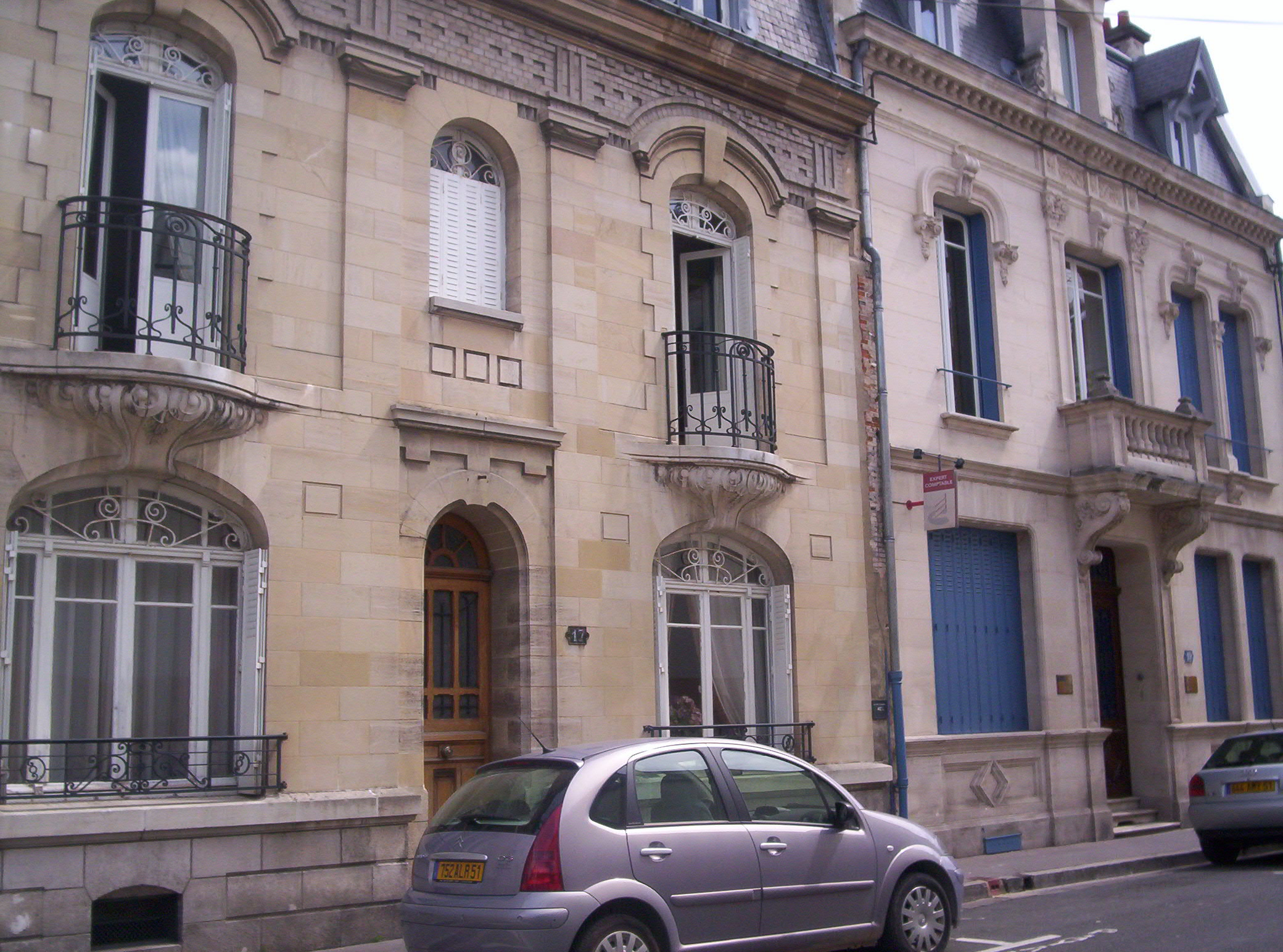 immeuble - rue des berceaux - Épernay